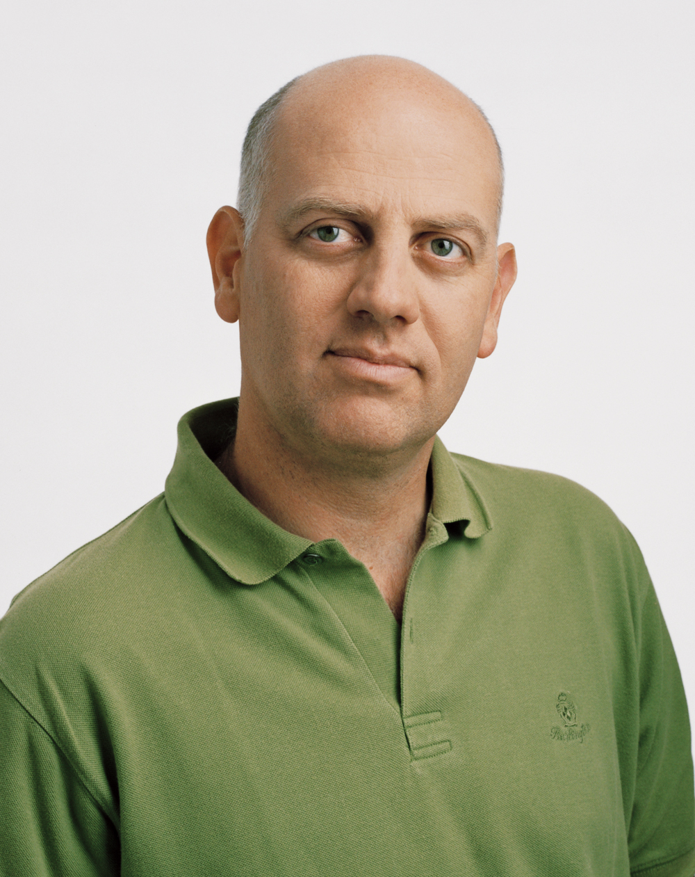 Christoph Chorherr. Wiener Landtagsabgeordnete und Mitglied des Wiener Gemeinderats